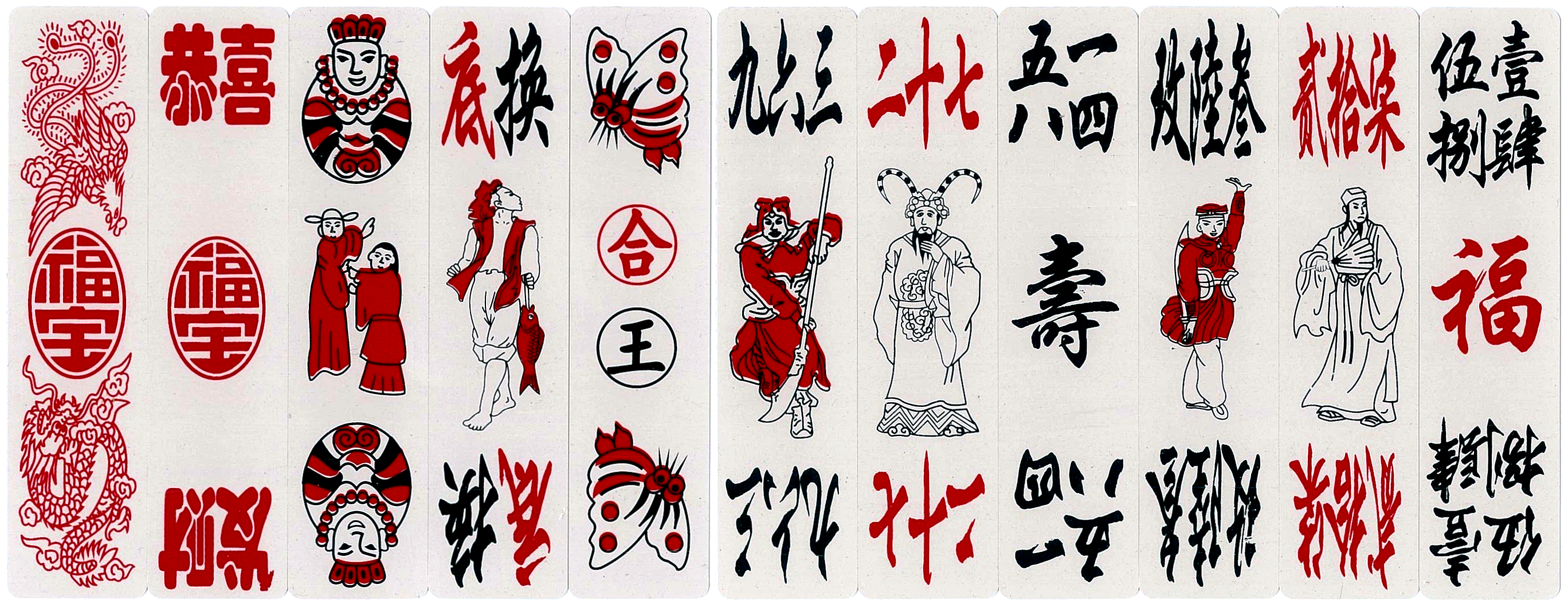 中文（台灣）: 字牌的其他牌